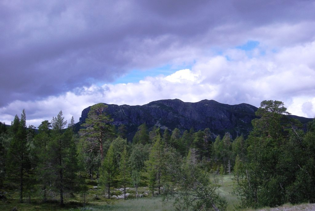 Fra Engerdal kommune sør for Elgå